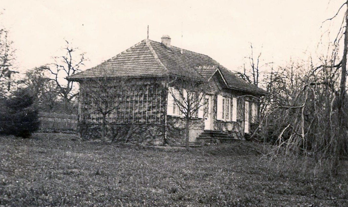 Gästehaus der "Villa Sternheim" in Uttwil (Frühling 1939)